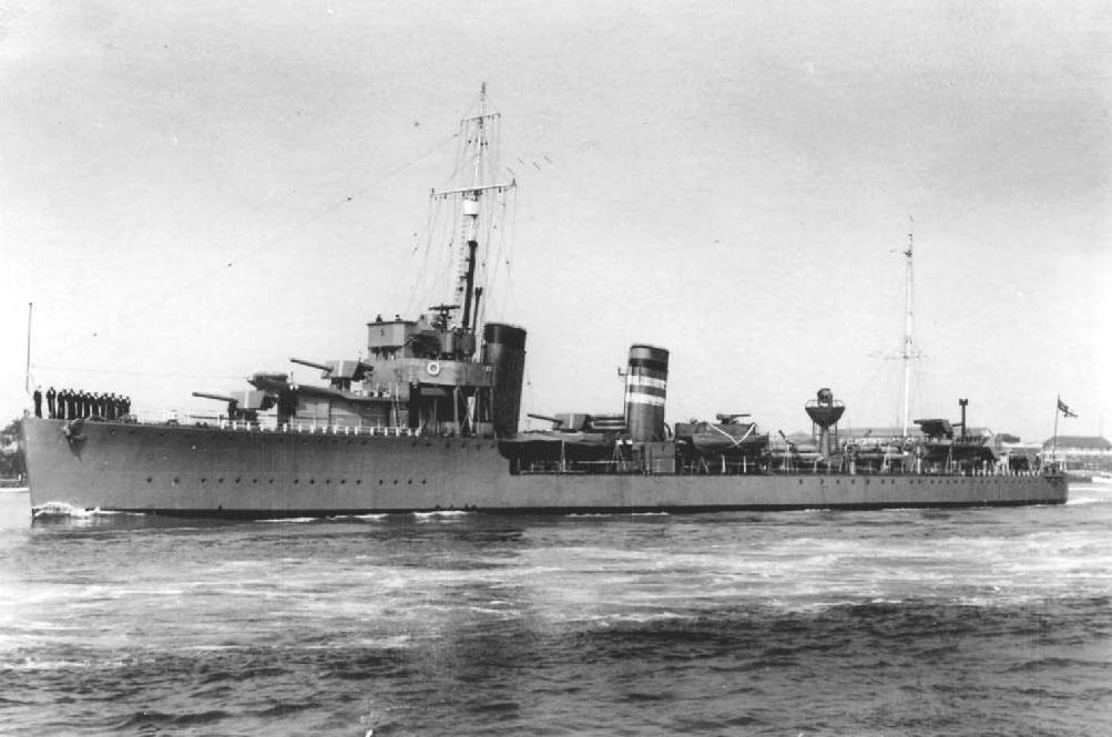 Der britische Flotillenführer HMS Keppel in seiner ursprünglichen Form